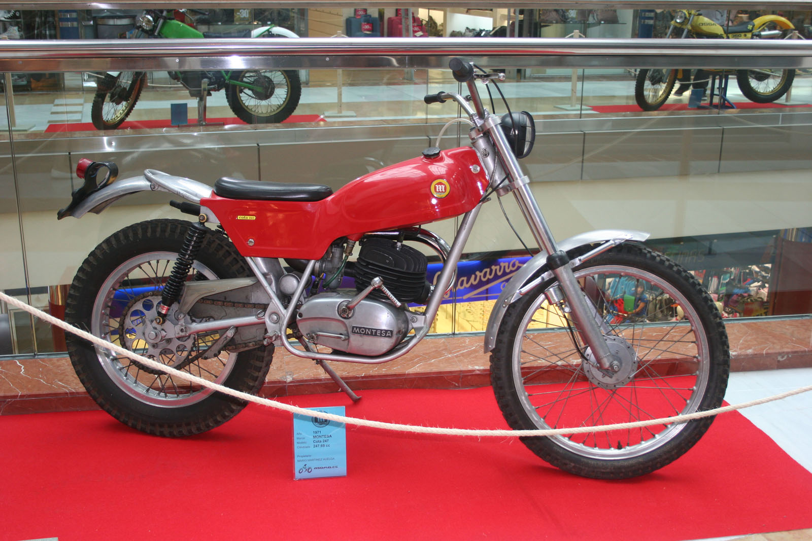 Montesa Cota 247, 1971 247,69 cc.